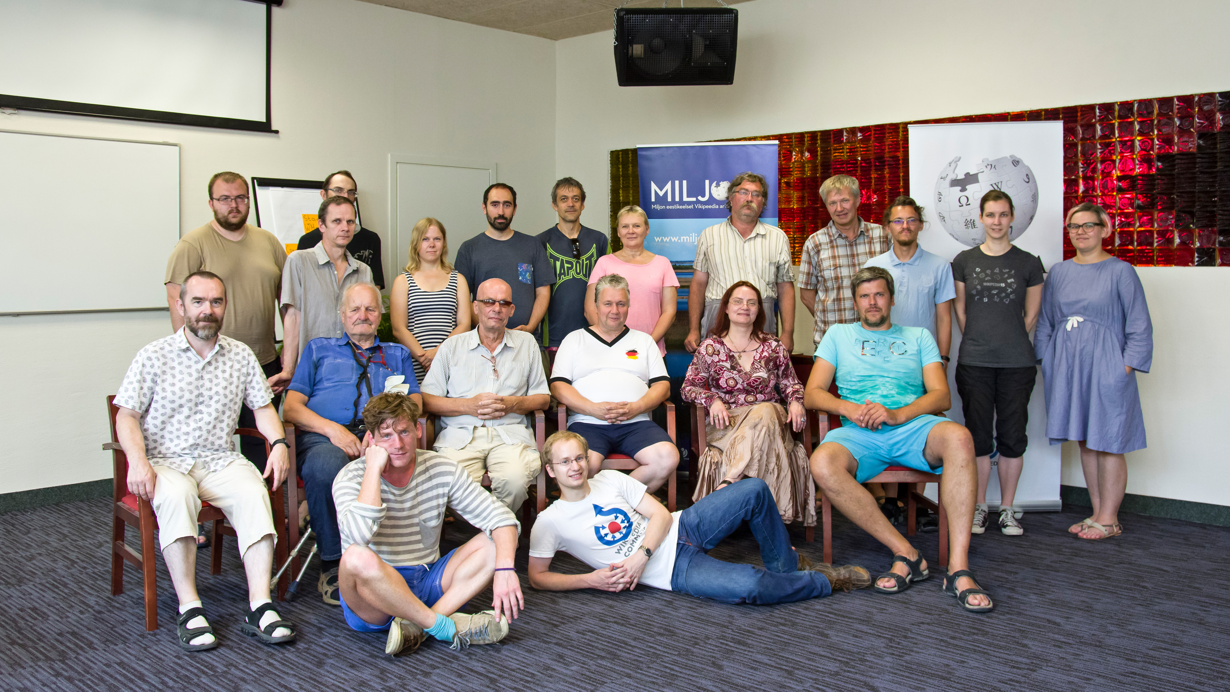 Eestikeelse Vikipeedia suvepäevadel osalejate ühispilt; eesti ja läti vikipedistid.